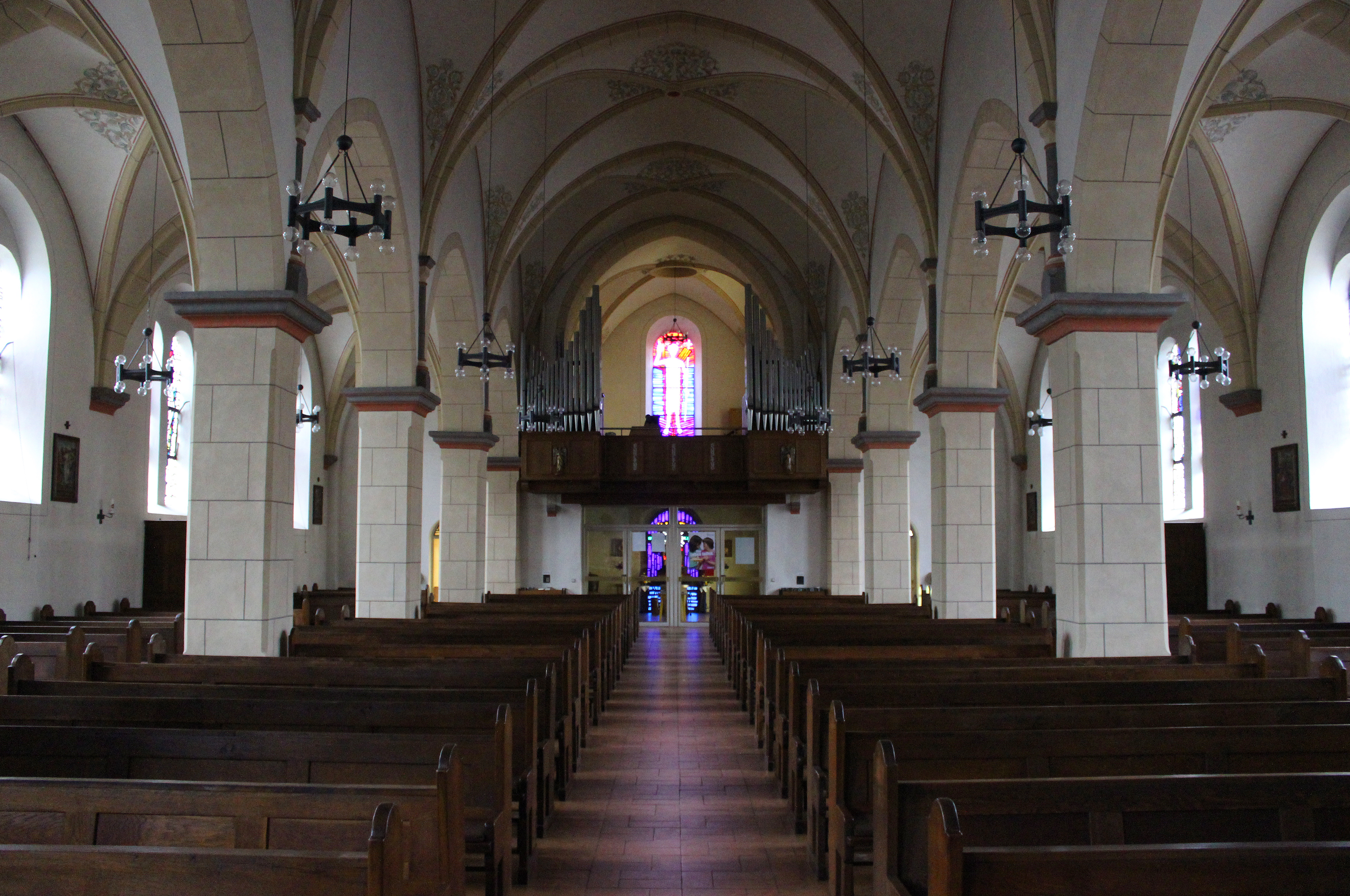 Blick ins Innere der katholischen Pfarrkirche Mariä Himmelfahrt in Humes, einem Ortsteil der Gemeinde Eppelborn, Landkreis Neunkirchen, Saarland.